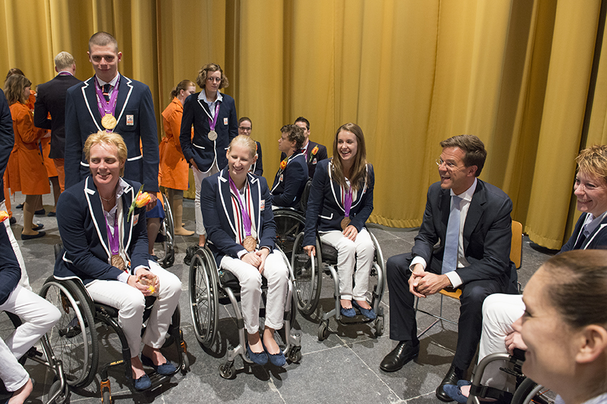 Minister-president Rutte tijdens de huldiging van de Nederlandse medaillewinnaars van de Paralympics in de Grote Kerk in Den Haag: ‘Het doorzettingsvermogen dat nodig is om daar in Londen te staan en al dat eremetaal binnen te halen is een grote inspiratie en een voorbeeld voor mij en ik denk voor alle Nederlanders. In ons werk, ons persoonlijk leven, bij het verwezenlijken van onze dromen en idealen, kunnen wij een voorbeeld nemen aan jullie’.